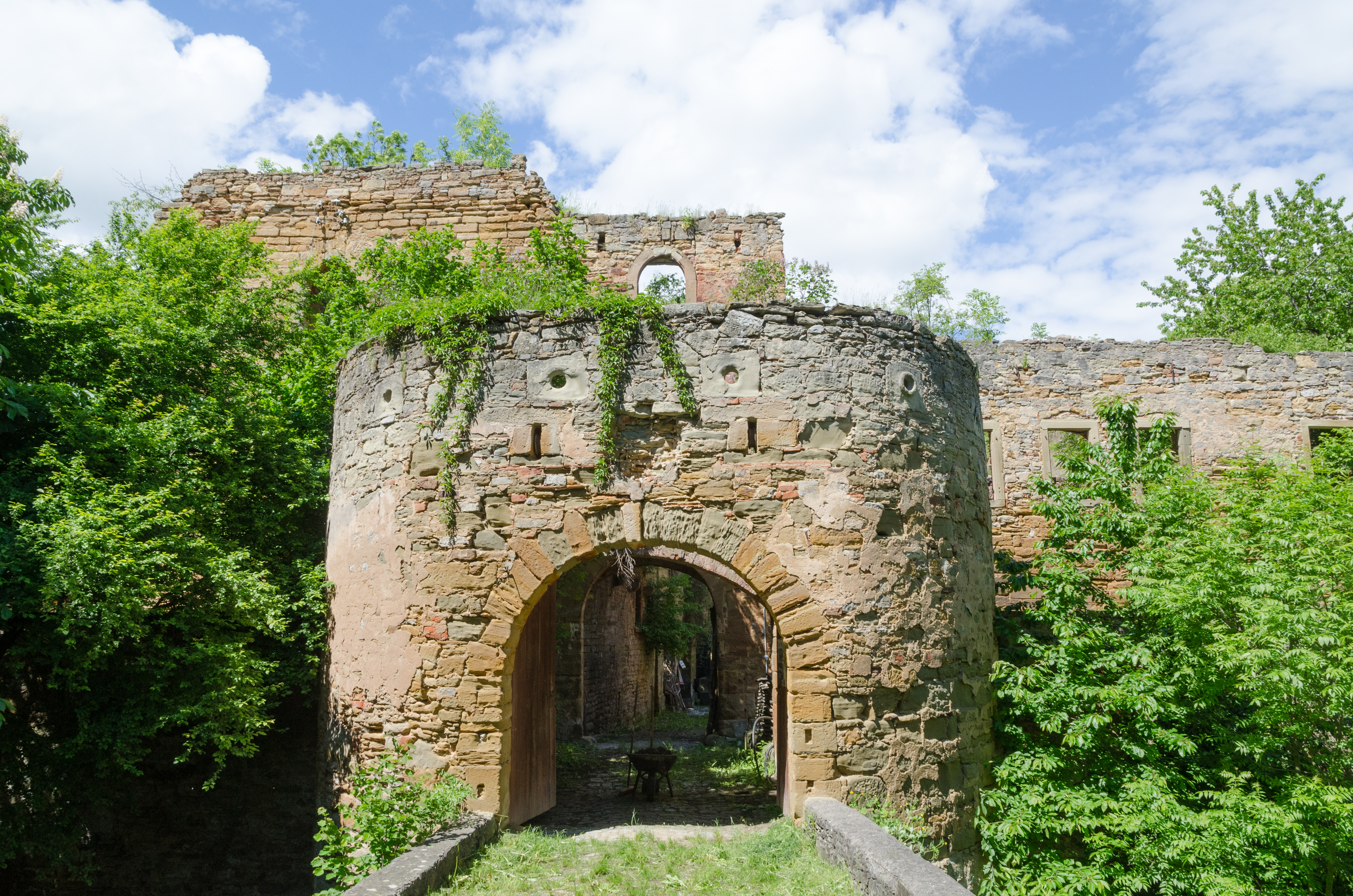 Wässerndorf, Schloßstraße 1